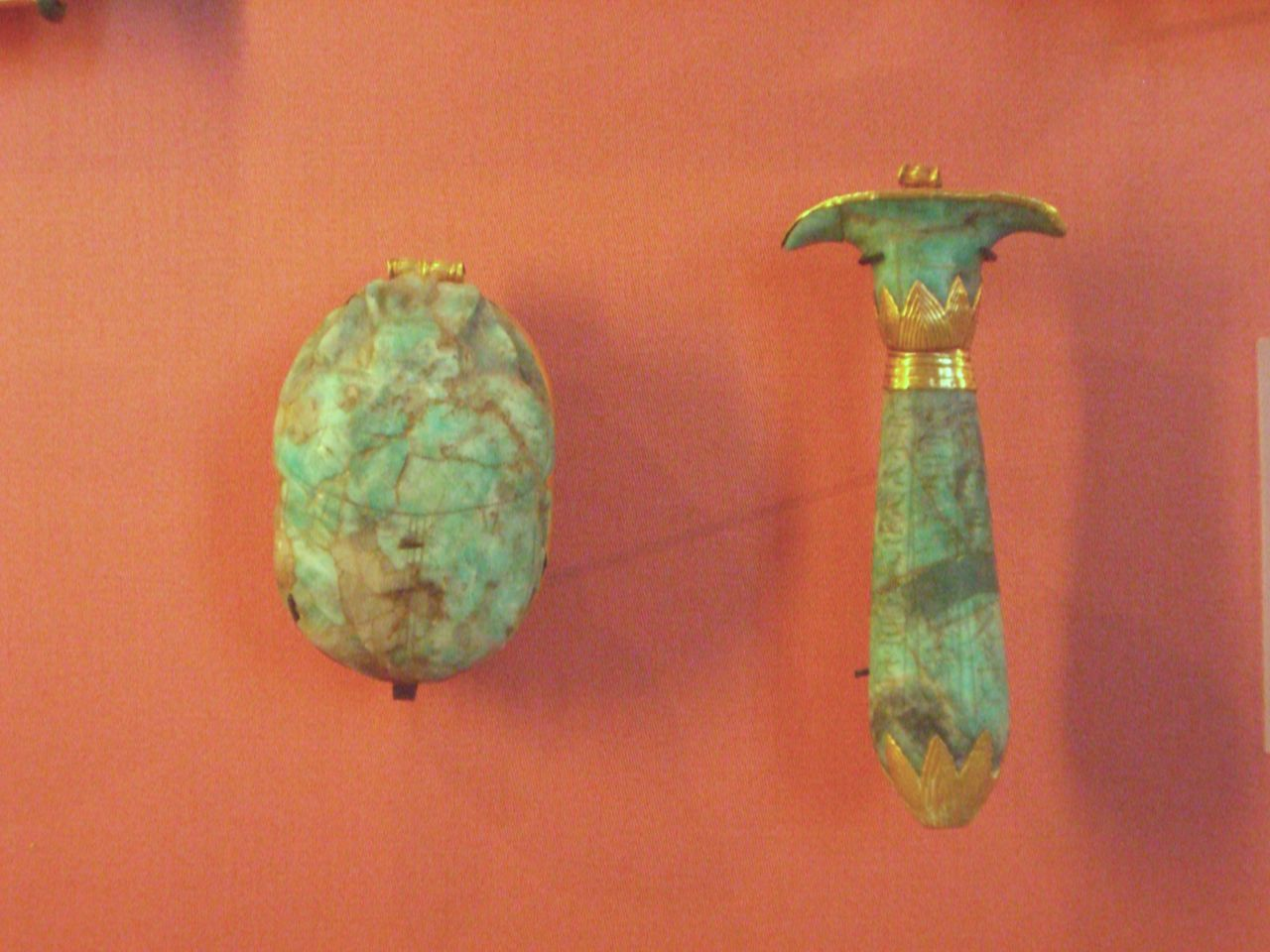 Amulettes au nom du vizir Paser, trouvées sur la momie d'un taureau Apis au Sérapéum à Saqqarah - XIXe dynastie égyptienne - Musée du Louvre